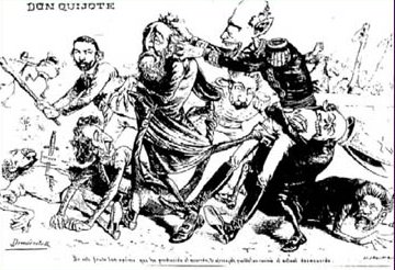 Portada de la Revista satírica argentina Don Quijote.